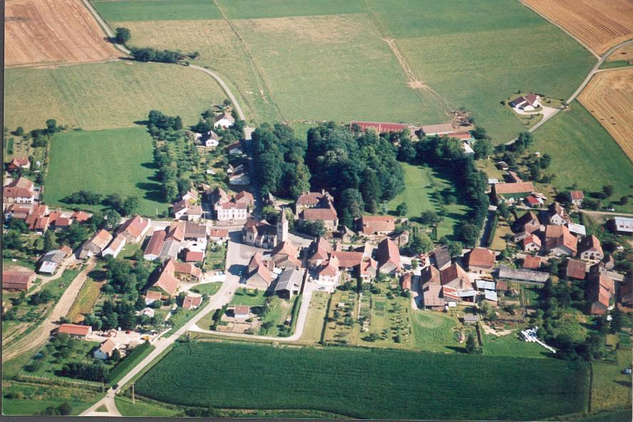 photo aérienne de Brans